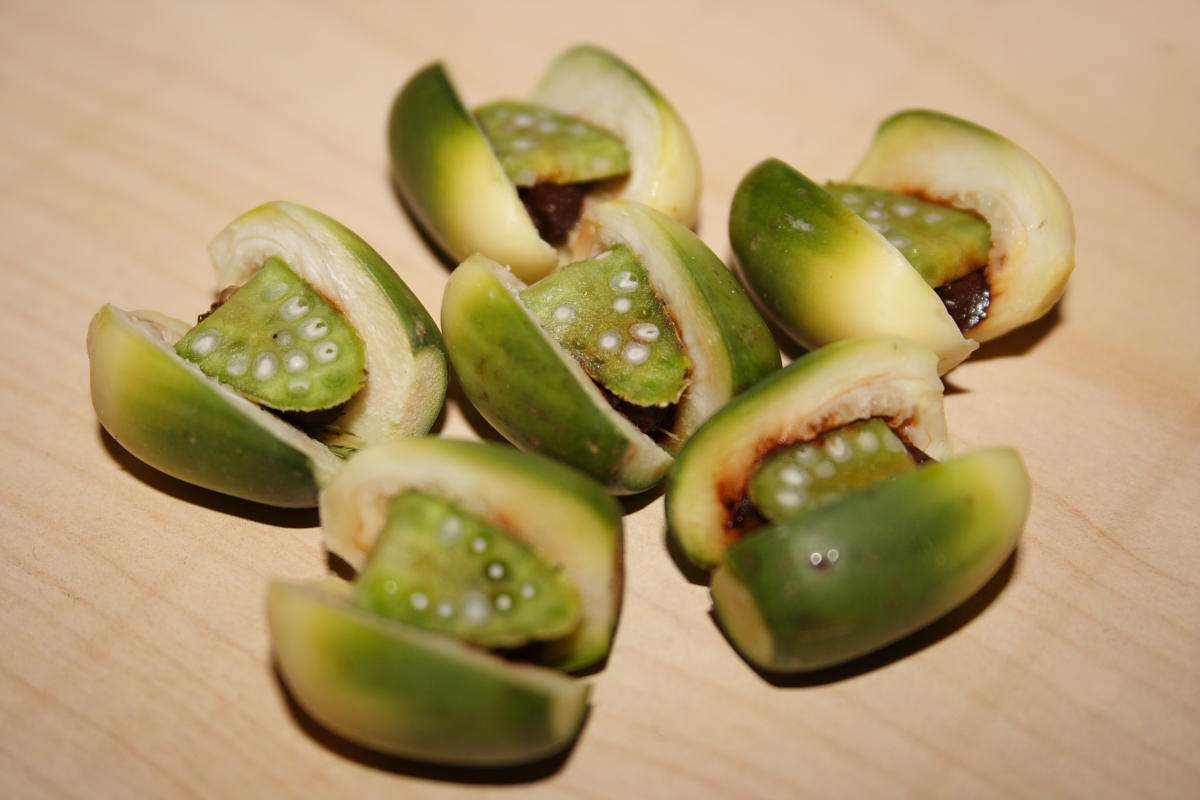 檳榔